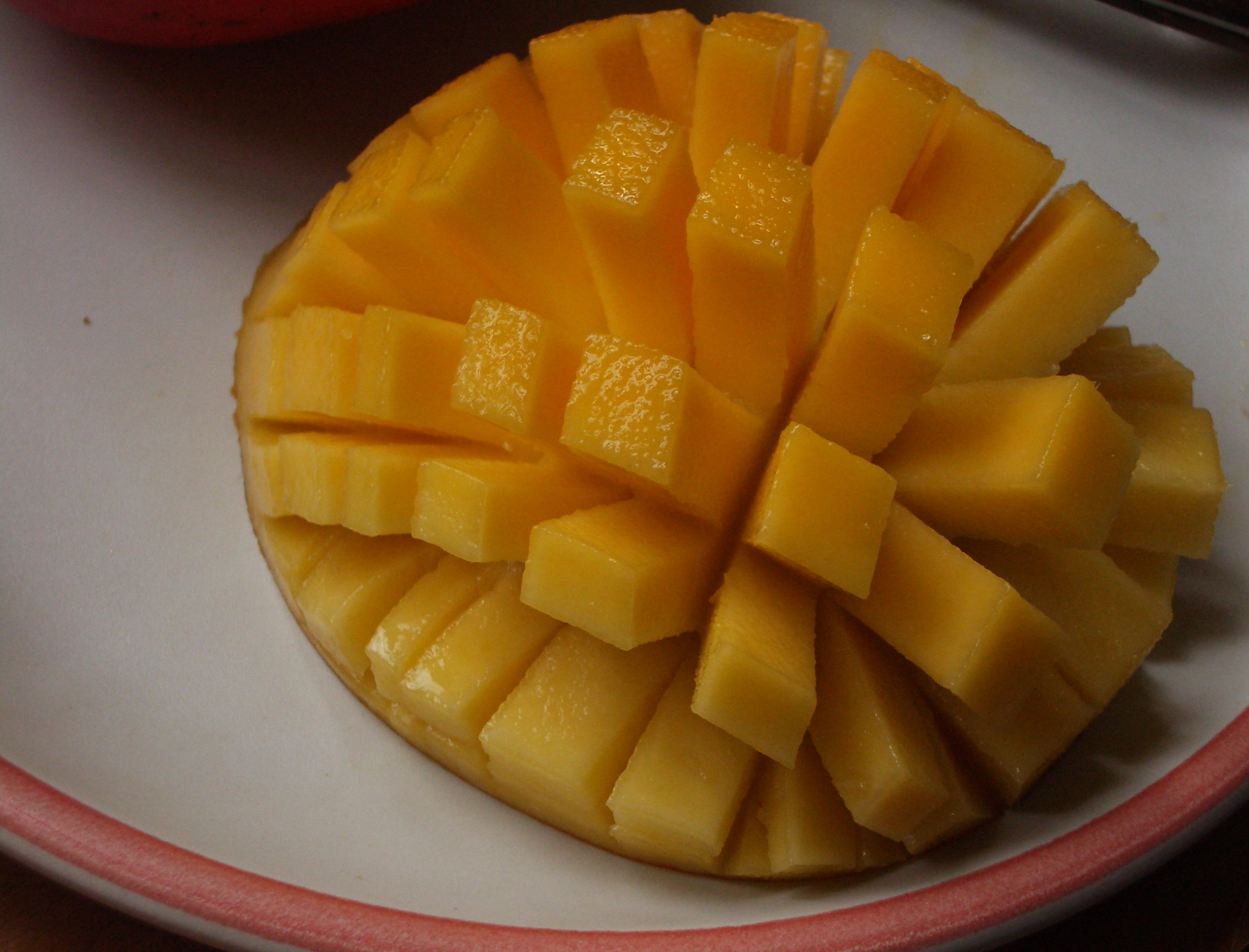 Une mangue découpée en sorte de dés. Sa petite étiquette-collant comportait le texte suivant: « Vidal Kaha Côte d'Ivoire #4959 Sans fibre » (le photographe a pu constater que la mangue était en effet sans fibre)